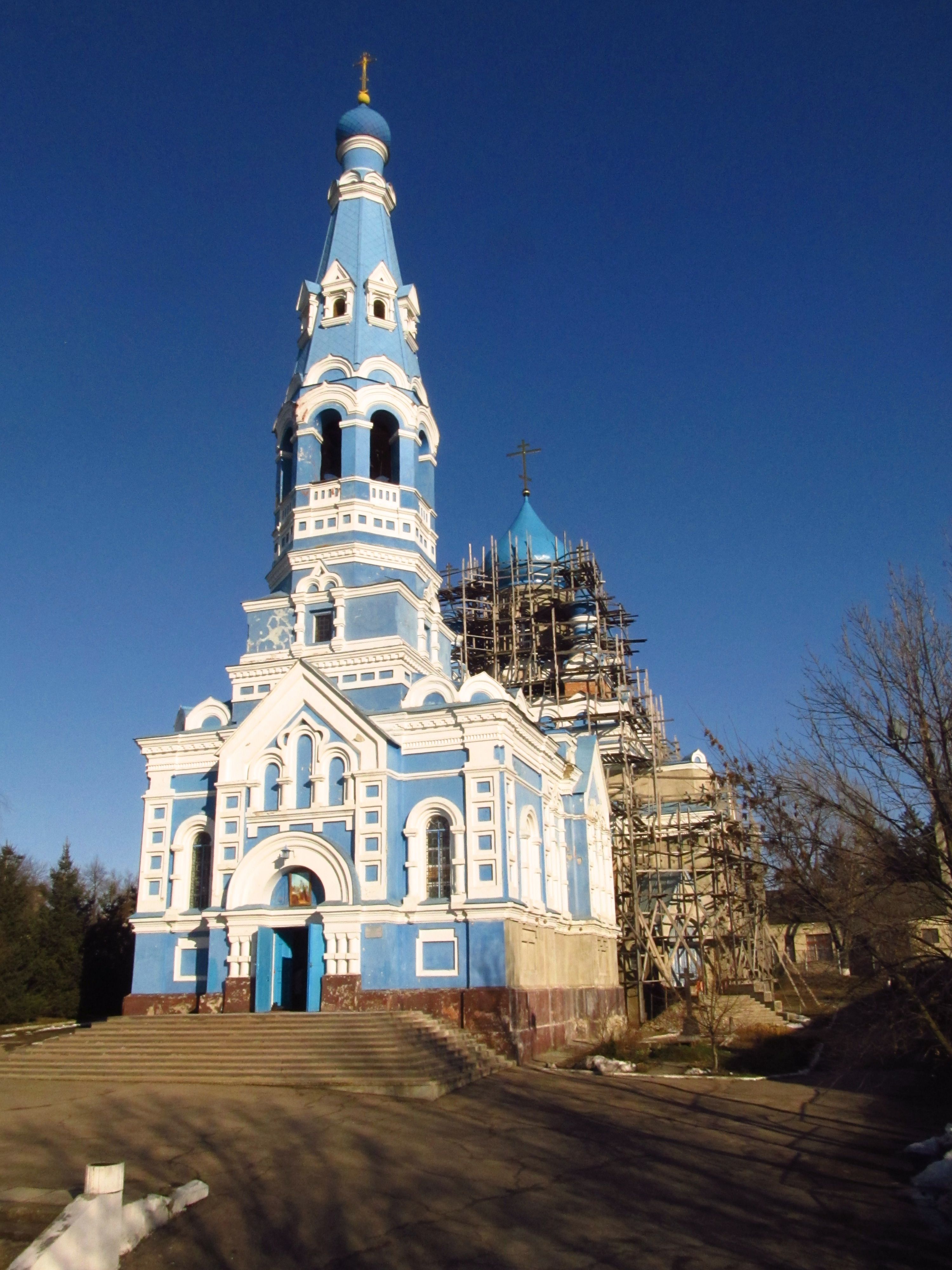 Успенський собор, Балта, вул. Ломоносова, 28